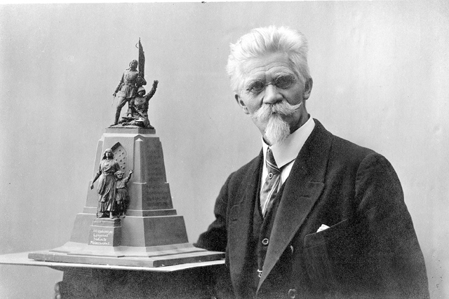 MuuseumikoguFotokogu OlemusfotoOriginaaloriginaalSäilivushea